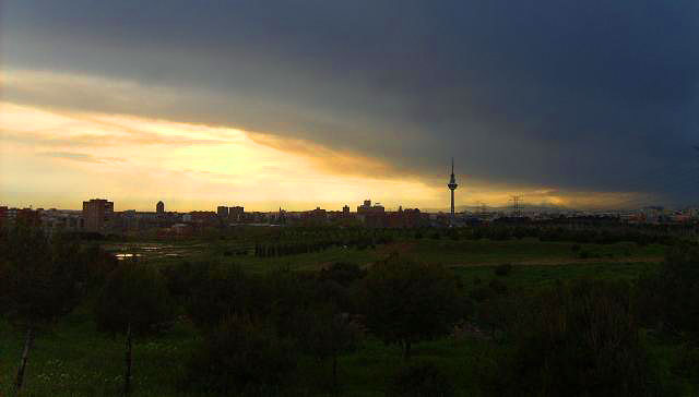 Atardecer en Madrid desde la Cuña Verde. Vista Este-Oeste. Torrespaña y distritos de Moratalaz, Retiro, Salamanca y Ciudad Lineal.